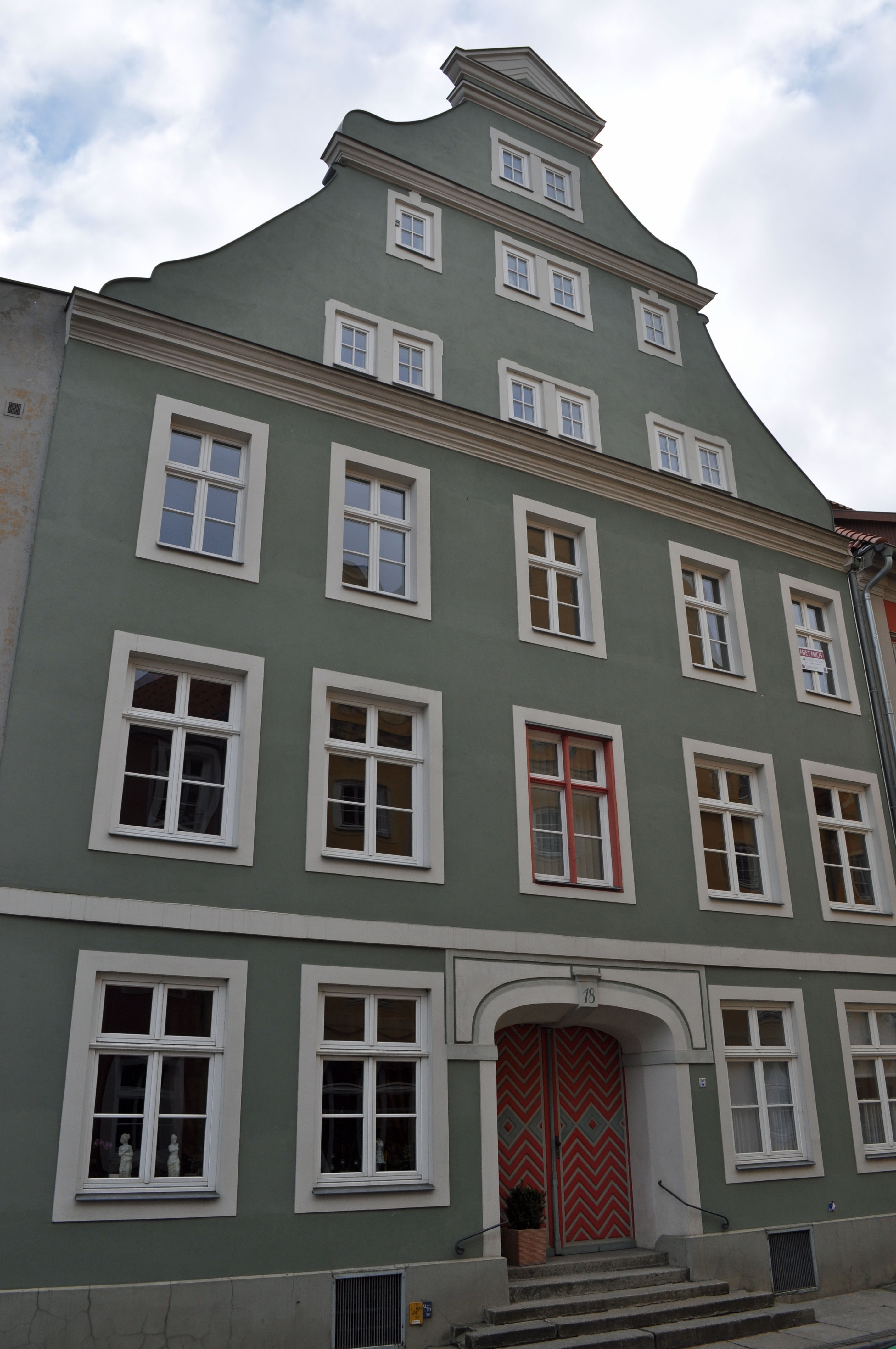 Gebäude bzw. Gebäudedetail in Stralsund. Straße und Hausnummer siehe Dateiname.